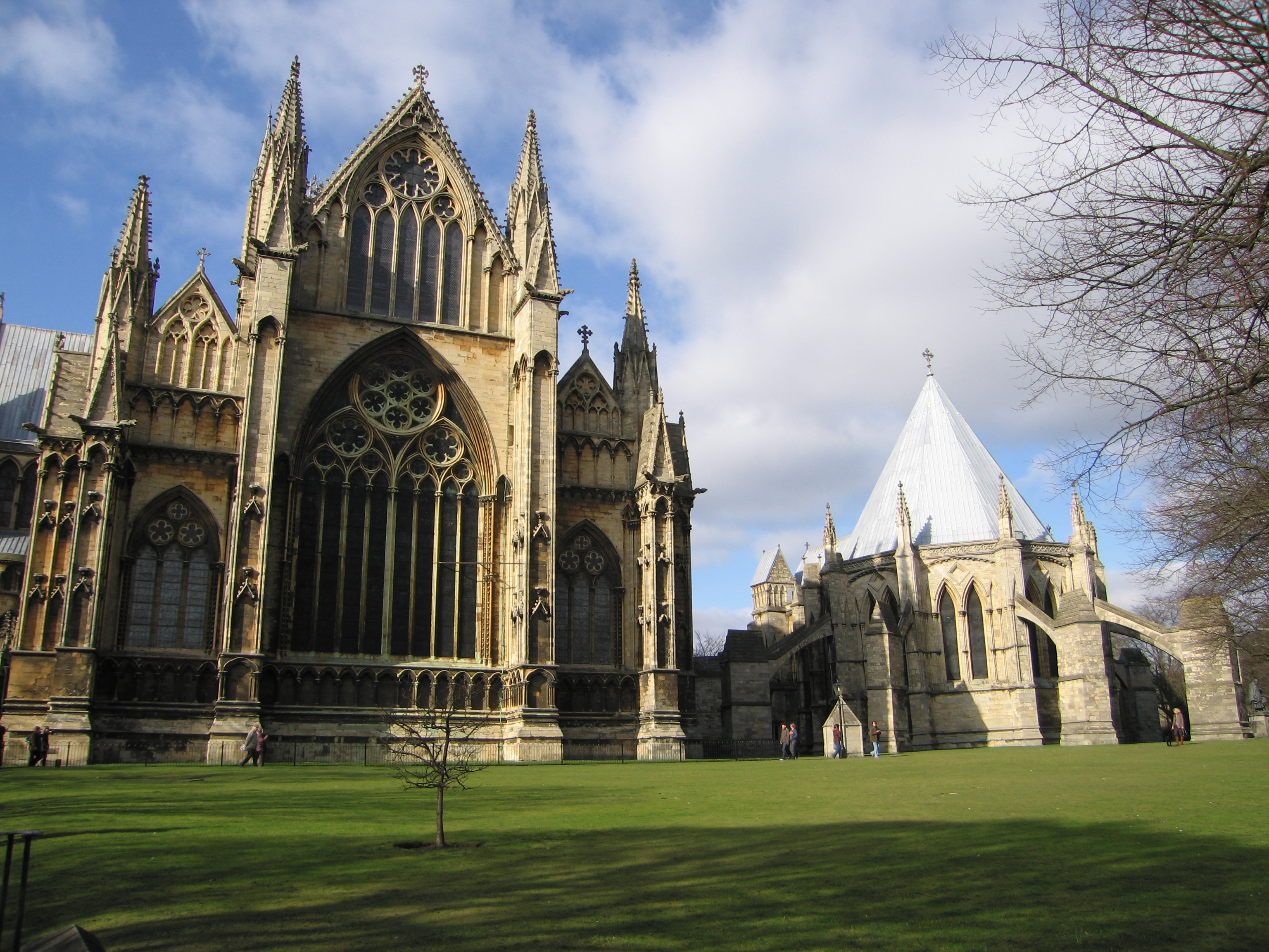 Lincoln, UK